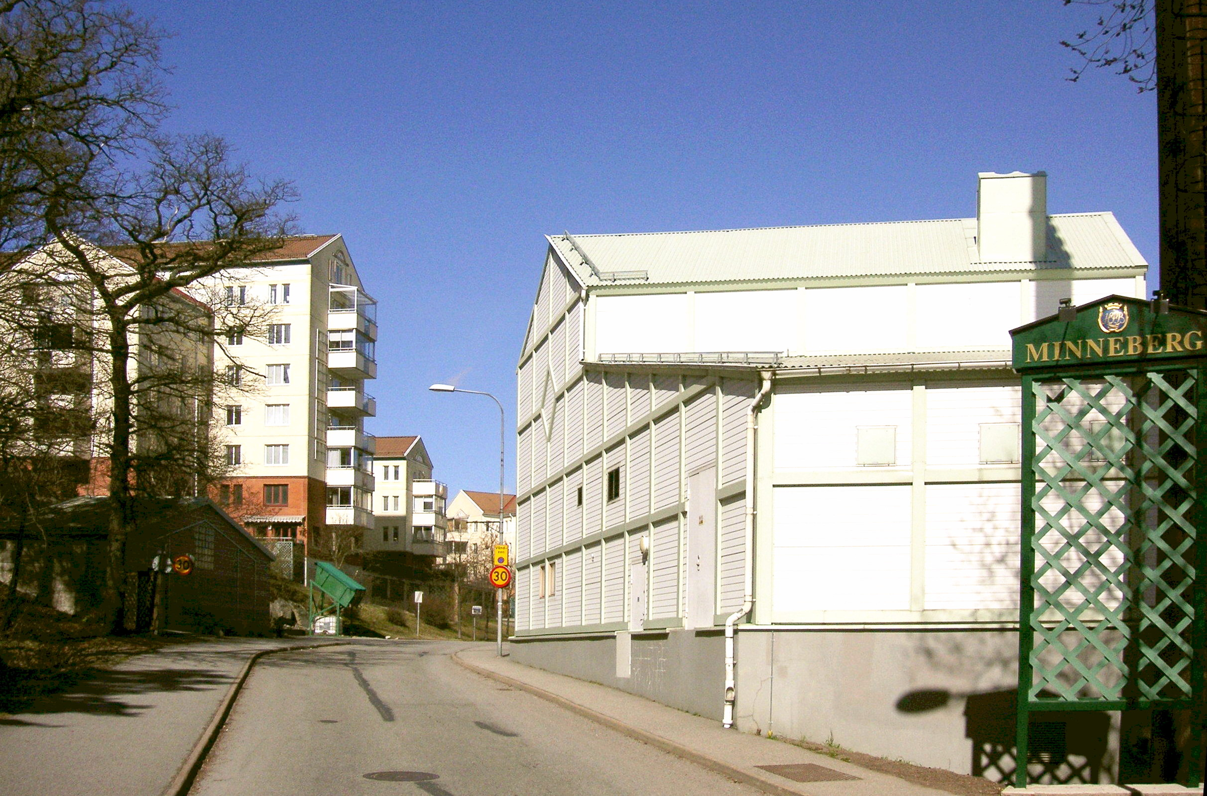 Bostadsområdet Minneberg, Stockholm, arkitekt Brunnberg & Forshed